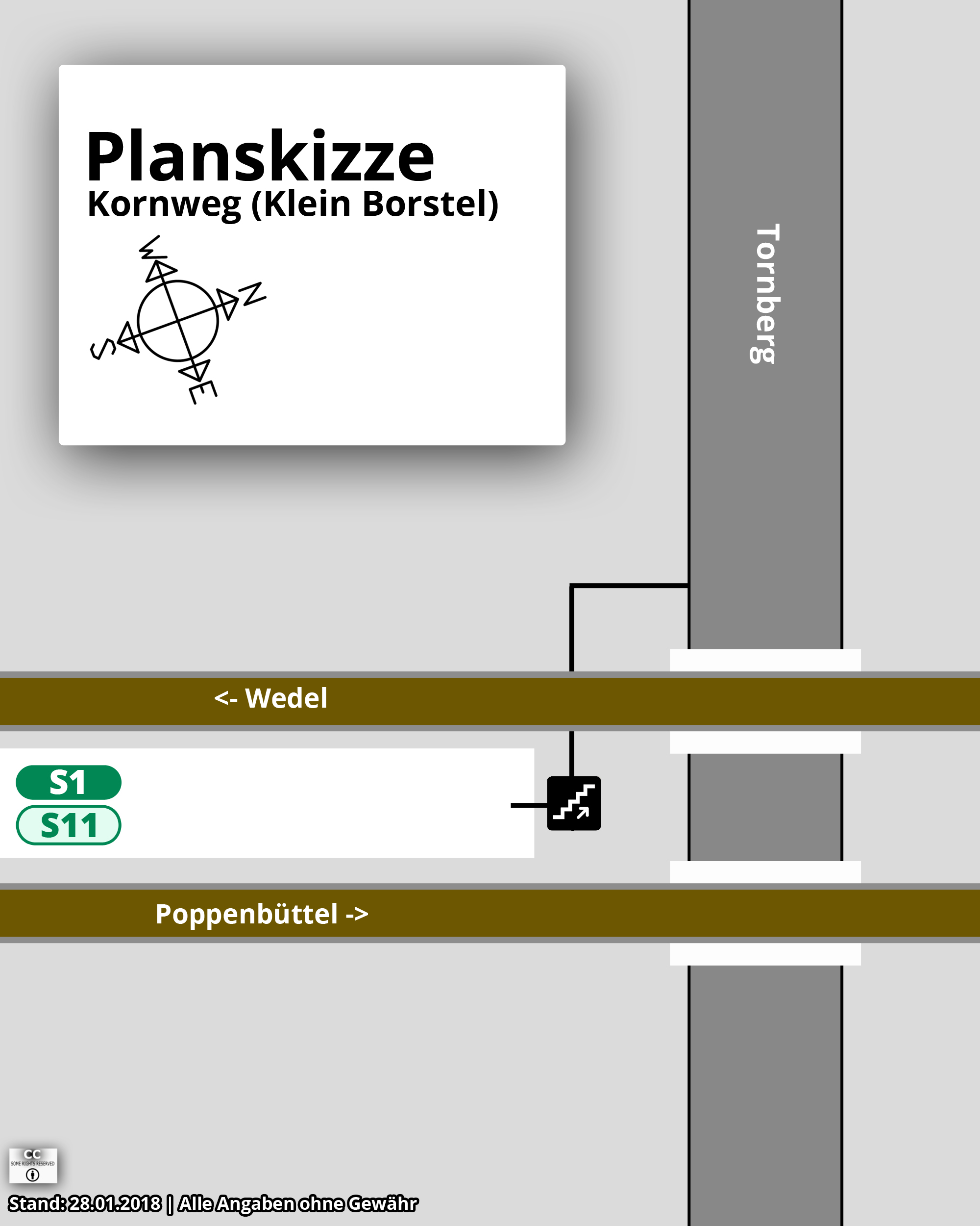 Planskizze für den Bhf. Hamburg-Kornweg